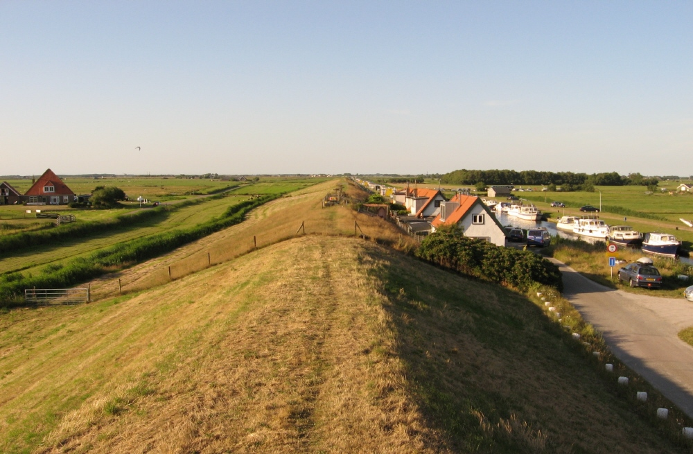 Slaperdijk bij de Hondsbossche Zeewering, in het land gelegen op meer dan een kilometer afstand van de kust (zeezijde links). In 1570 hield deze reservedijk het zeewater tegen.